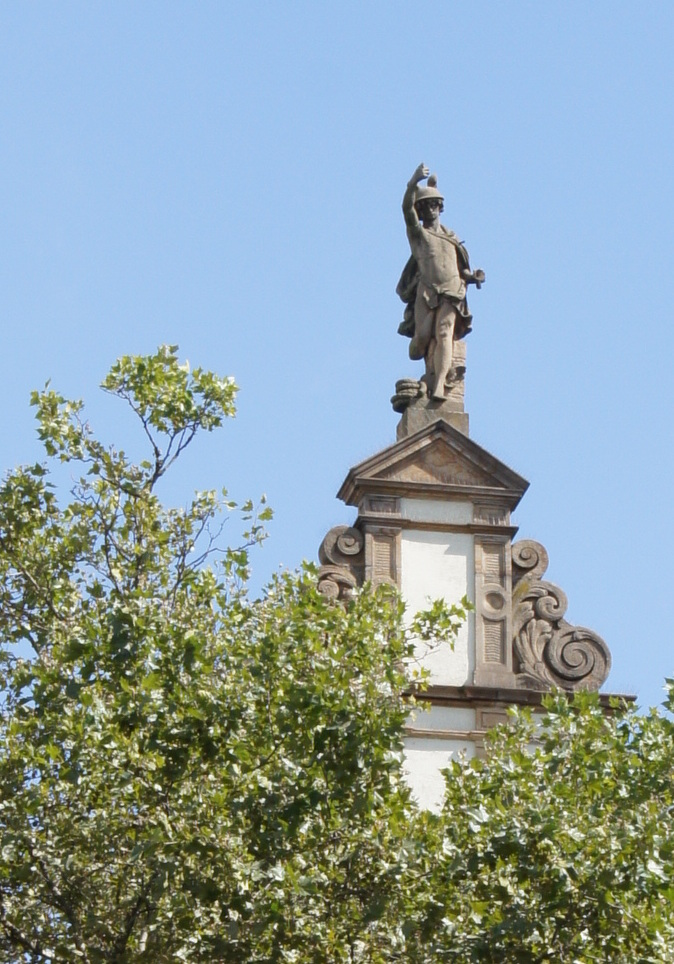 Merkurstatue auf dem Gebäude der Kaiser-Joseph-Straße 243 (Ecke zur Gerberau) in Freiburg i. Br. Wohl von Julius Seitz geschaffen.